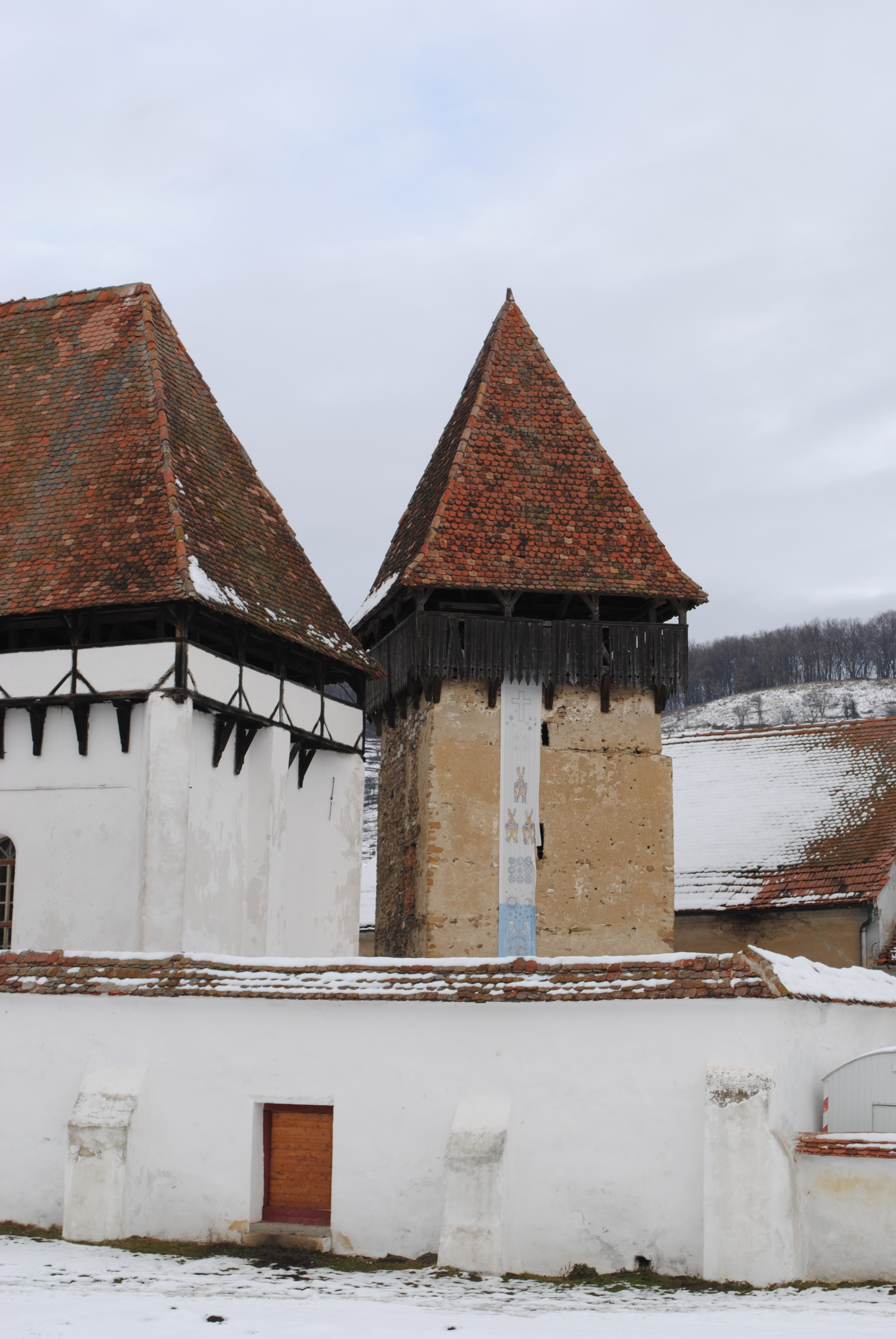 Ansamblul bisericii evanghelice fortificate, sf. sec. XV - sec. XIX 02